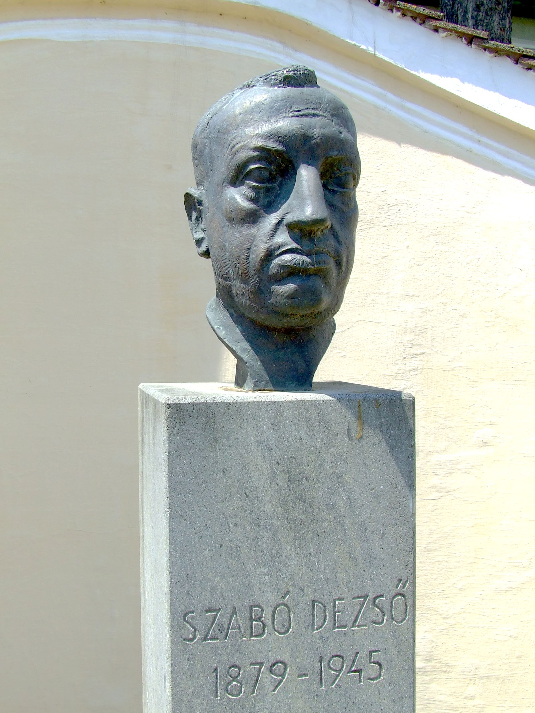 Szabó Dezső szobra Illyefalván. Vargha Mihály kézdivásárhelyi születésű (1961) szobrászművész alkotása (1998)